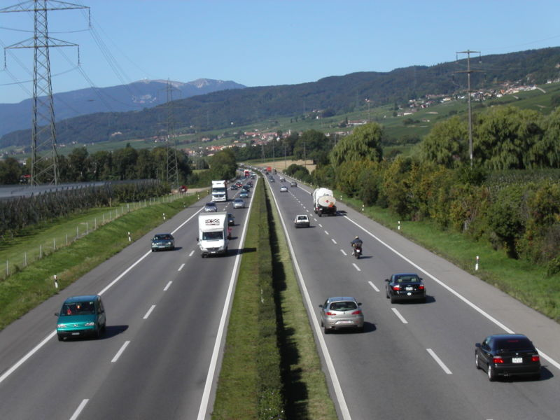 une autoroute en Suisse